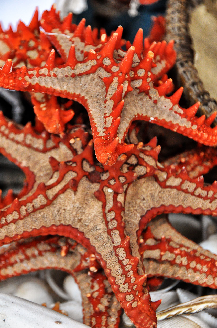 Dar es Salaam